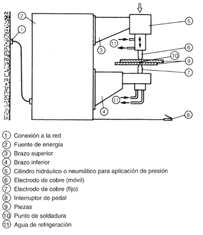 Les parts d'un equip de soldadura per punts